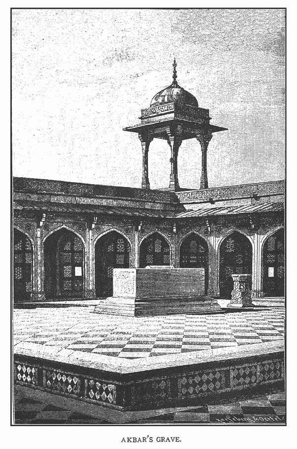 Makam Akbar - Proyek Gutenberg